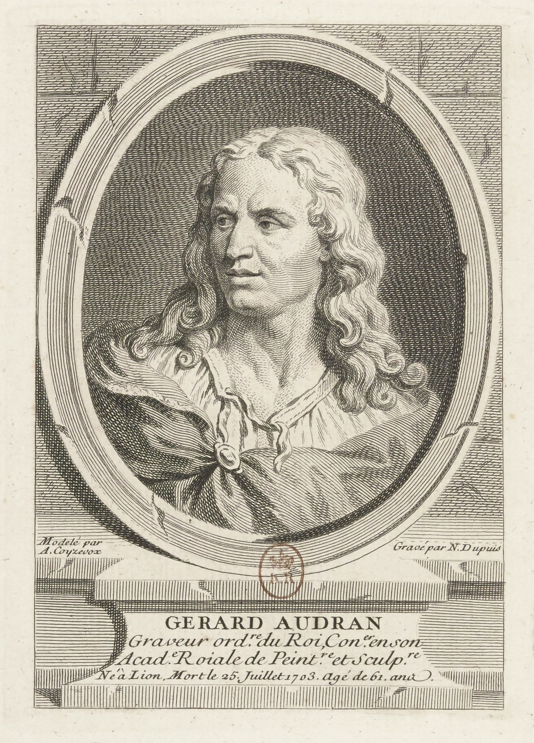 Gérard Audran (1640 - 1703), sculpteur français.